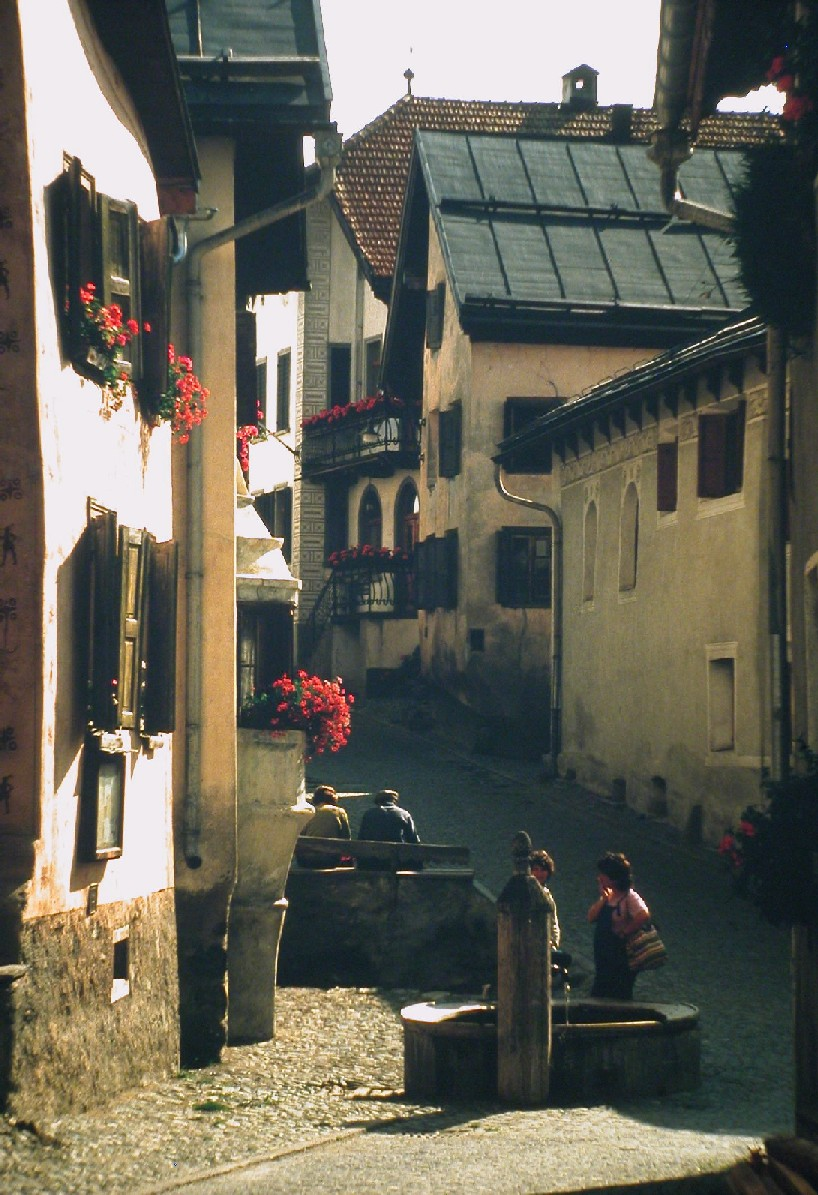 Treff am Brunnen